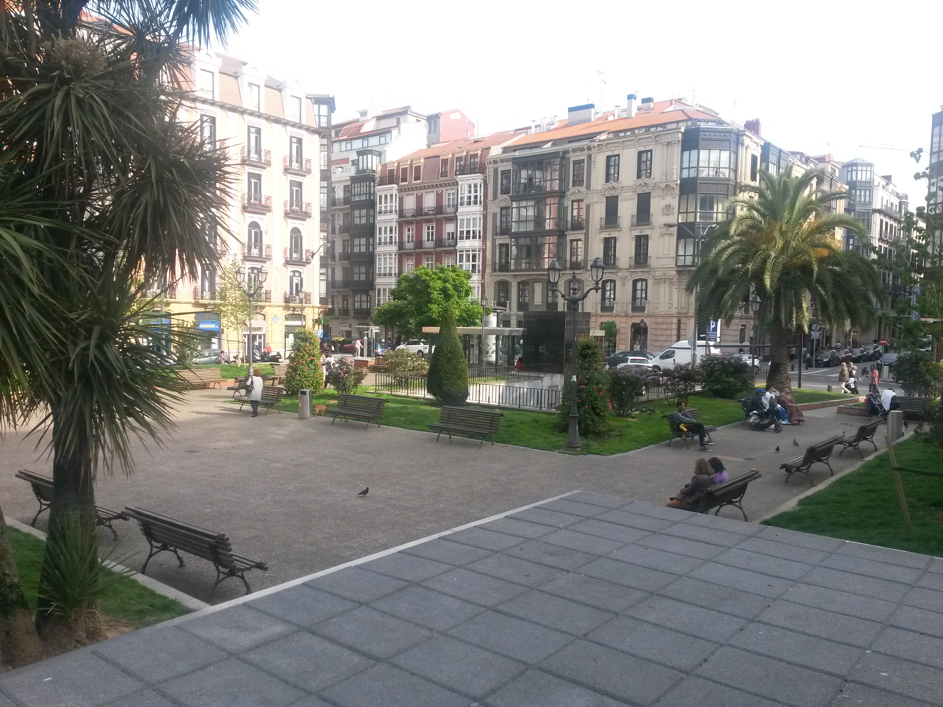 Plaza del Ensanche, Bilbao.